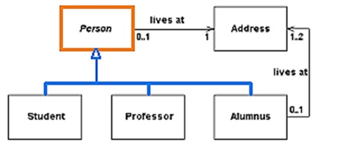 Imatge que descriu una generalització/especialització en un diagrama de classes.